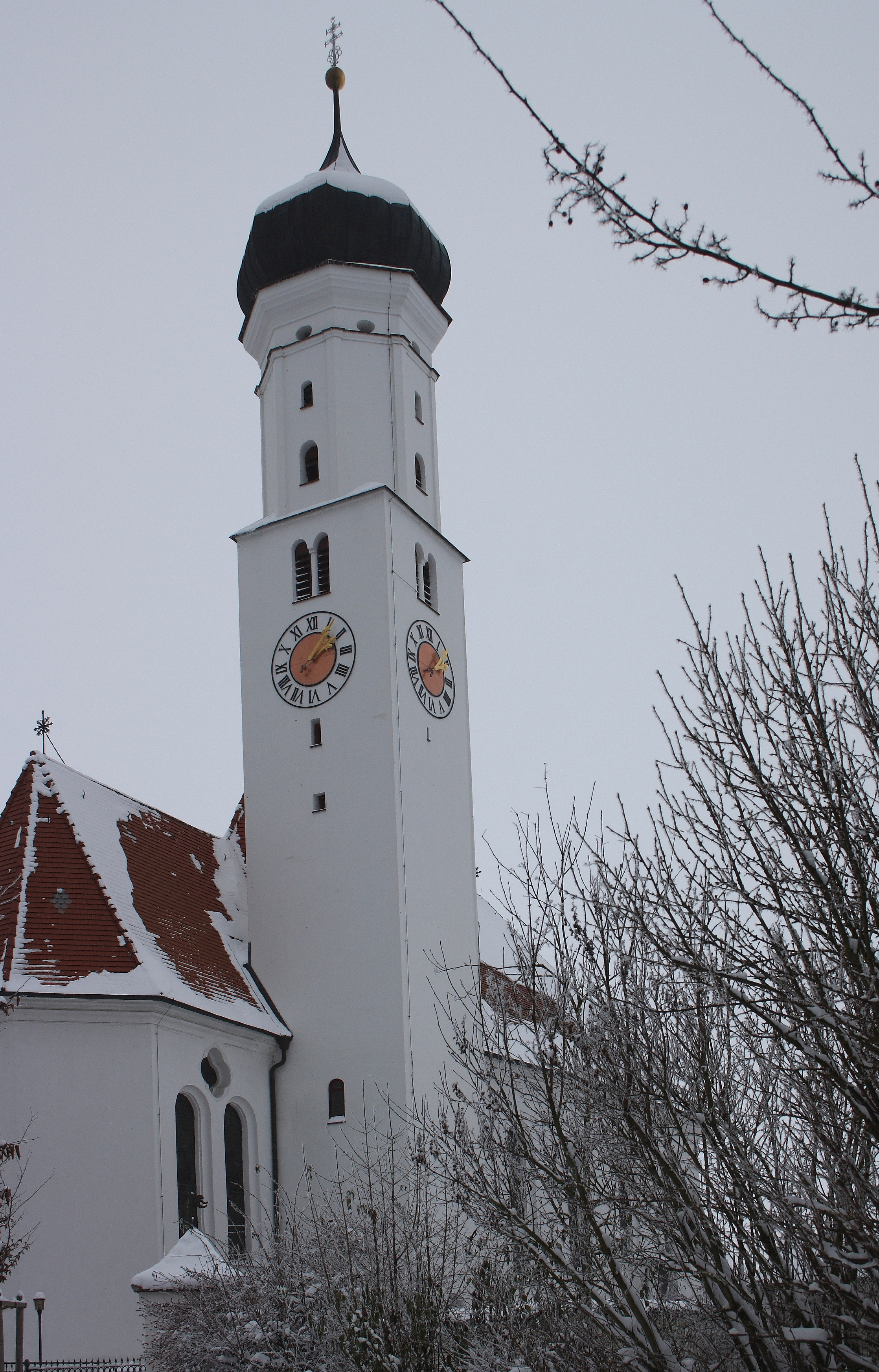 Katholische Pfarrkirche St. Nikolaus in Oberndorf am Lech, einer Gemeinde im Landkreis Donau-Ries (Bayern), nach Plänen von Joseph Dossenberger 1773-1781 errichtet, Turmunterbau wohl 16. Jahrhundert, Zwiebelhaube von 1837